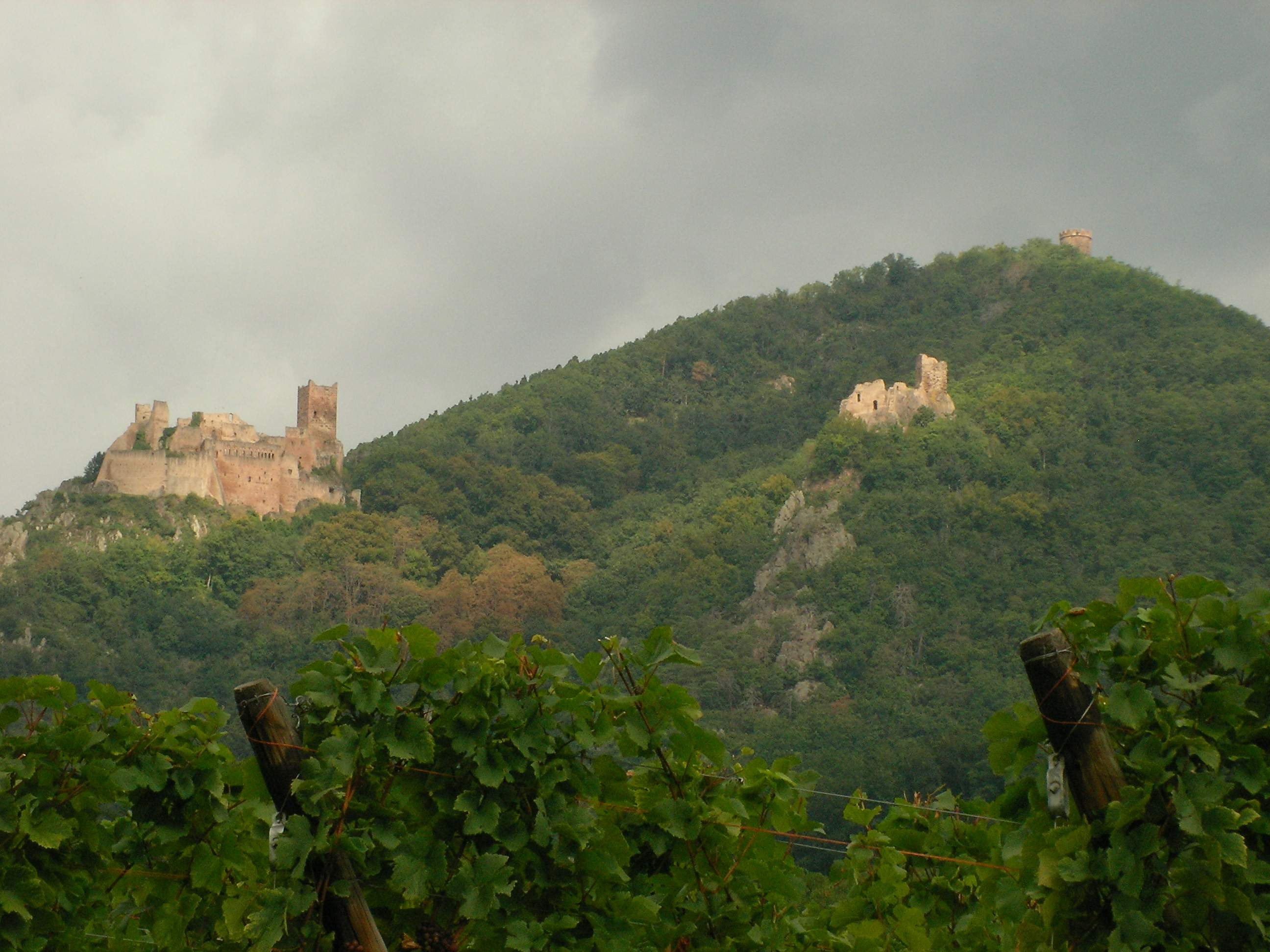 Vue depuis Ribeauvillé des châteaux du Saint-Ulrich (528 m), du Girsberg (528 m) et du Haut-Ribeaupierre (642 m) à Ribeauvillé (Haut-Rhin, France).